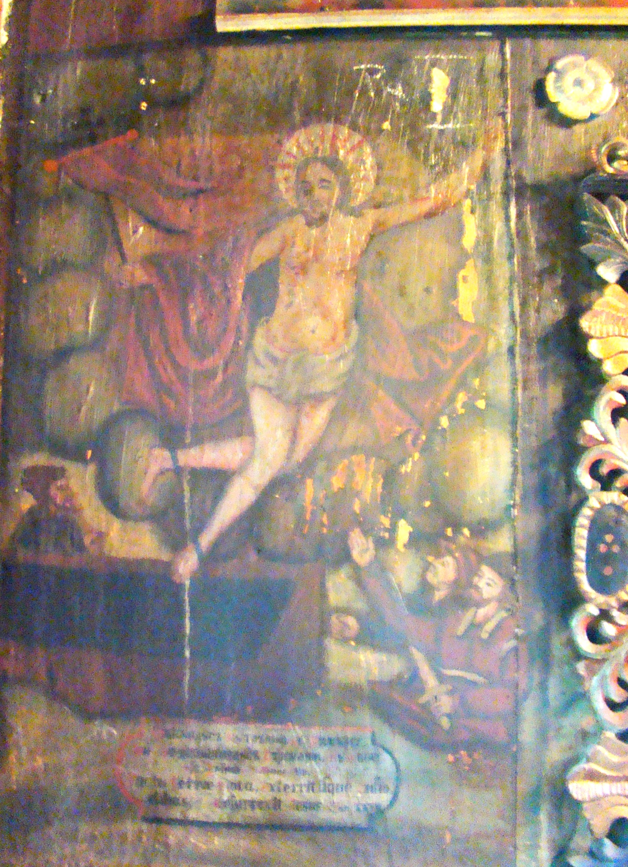 Biserica „Sf. Arhangheli Mihail și Gavriil” din Răstoci”, județul Sălaj